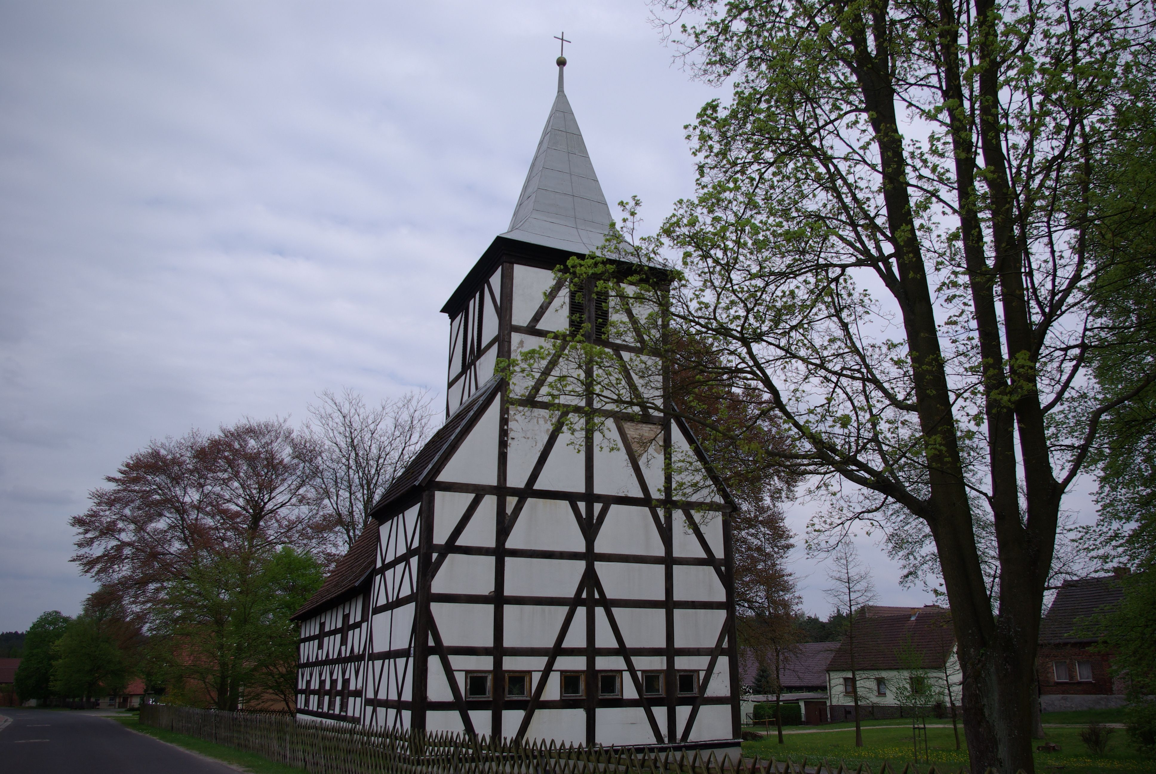 Siehdichum Ortsteil Rießen in Brandenburg. Die Kirche stammt aus dem 17. Jahrhundert. Sie steht unter Denkmalschutz.